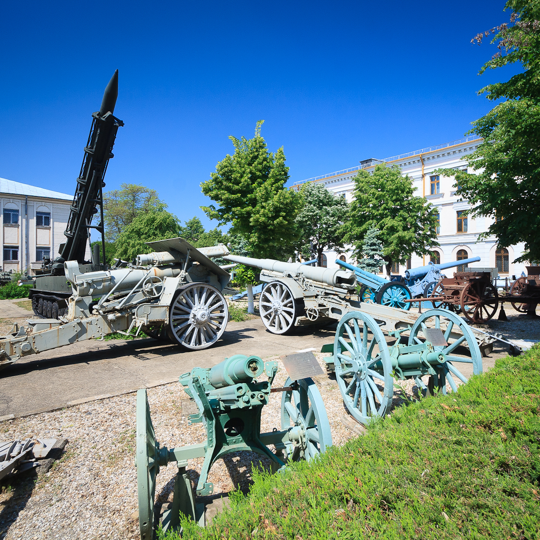 Curte - Muzeul Militar National, Bucuresti